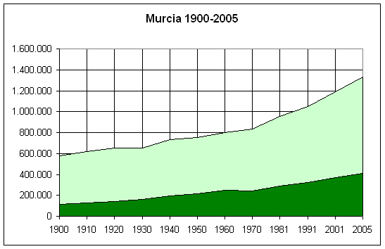 Población por decenios y 2005. En verde claro, la región; en verde oscuro, la capital. The population of the city of Murcia (dark green) and the region of Murcia (light green), Spain, (1900-2005). Own work, given to PD. Source: Instituto Nacional de Estadística.